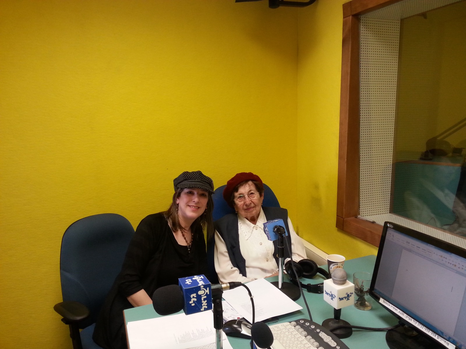 שרה ליבוביץ וביתה אתי אלבוים בשידור ברדיו על סיפור חייה של שרה